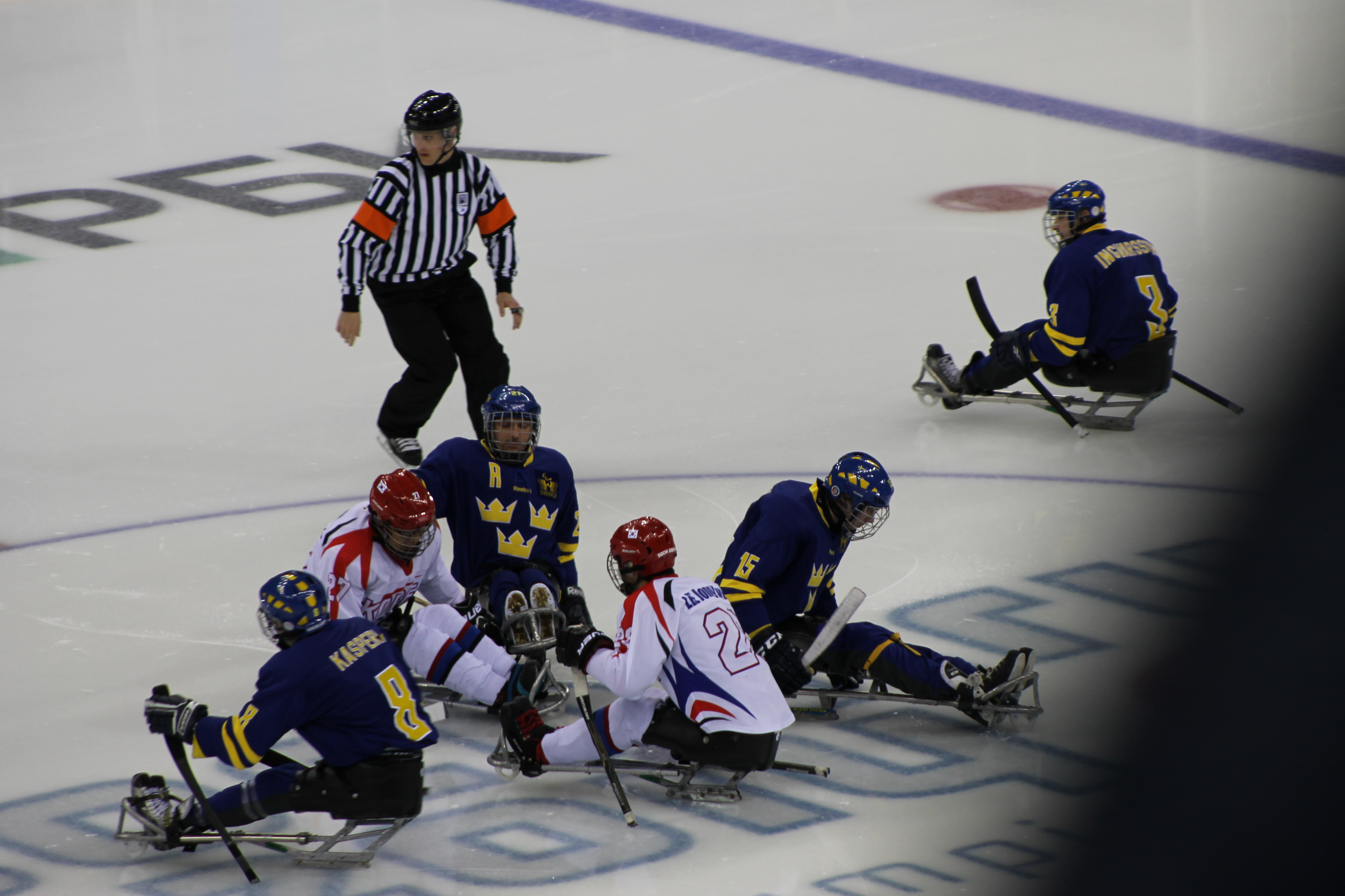 Слейдж-хоккей на зимних Паралимпийских играх 2014 в Сочи